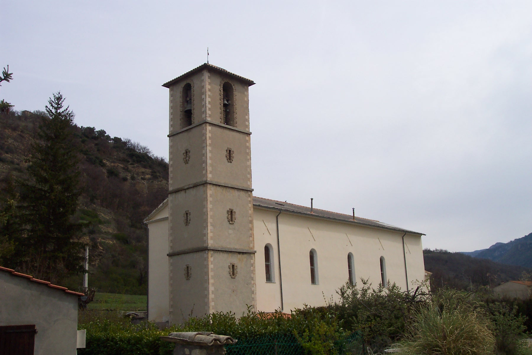 L'église